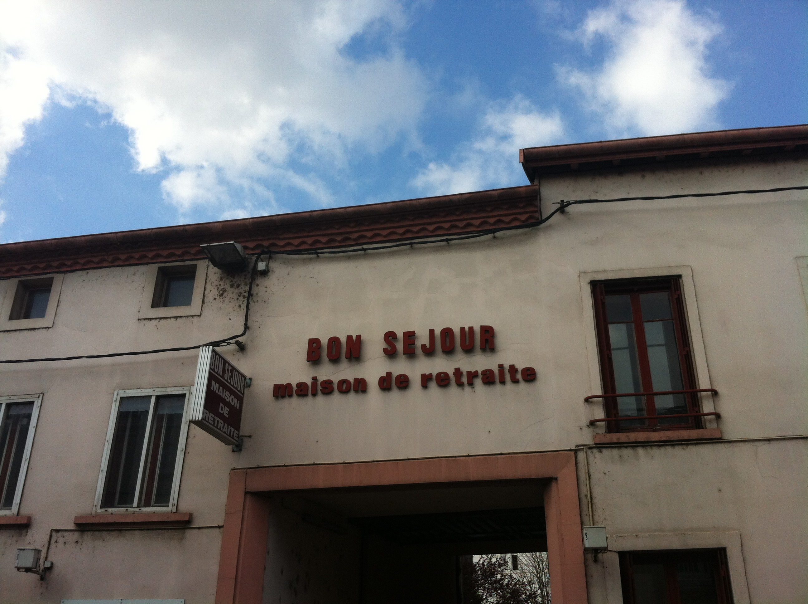 Maison de retraite Bon Sejour (Miribel).